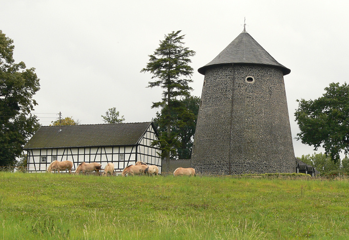 Villip, Mühlenturm